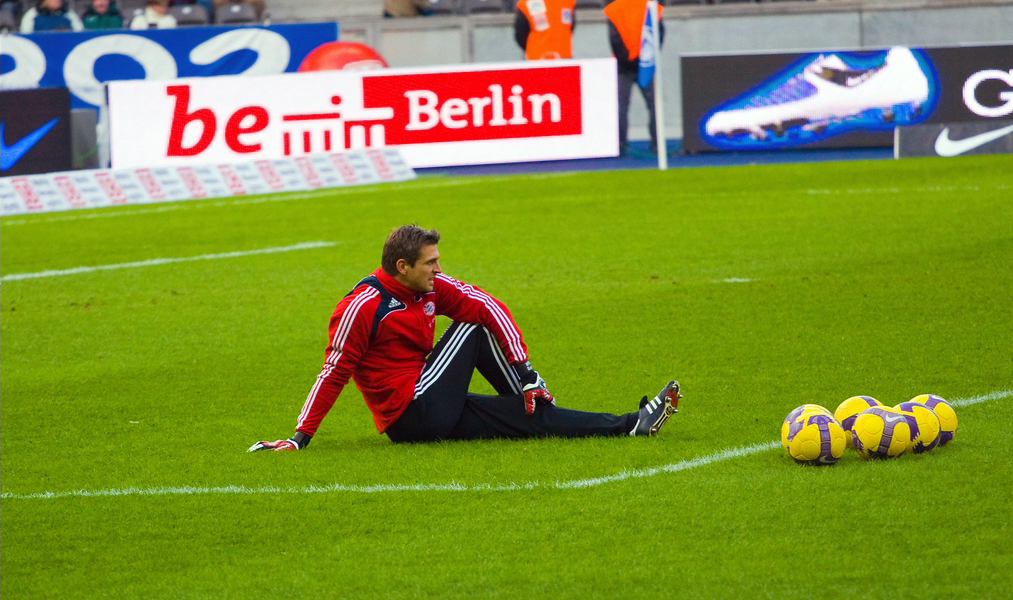 Hans Jörg Butt – der Ersatzkeeper